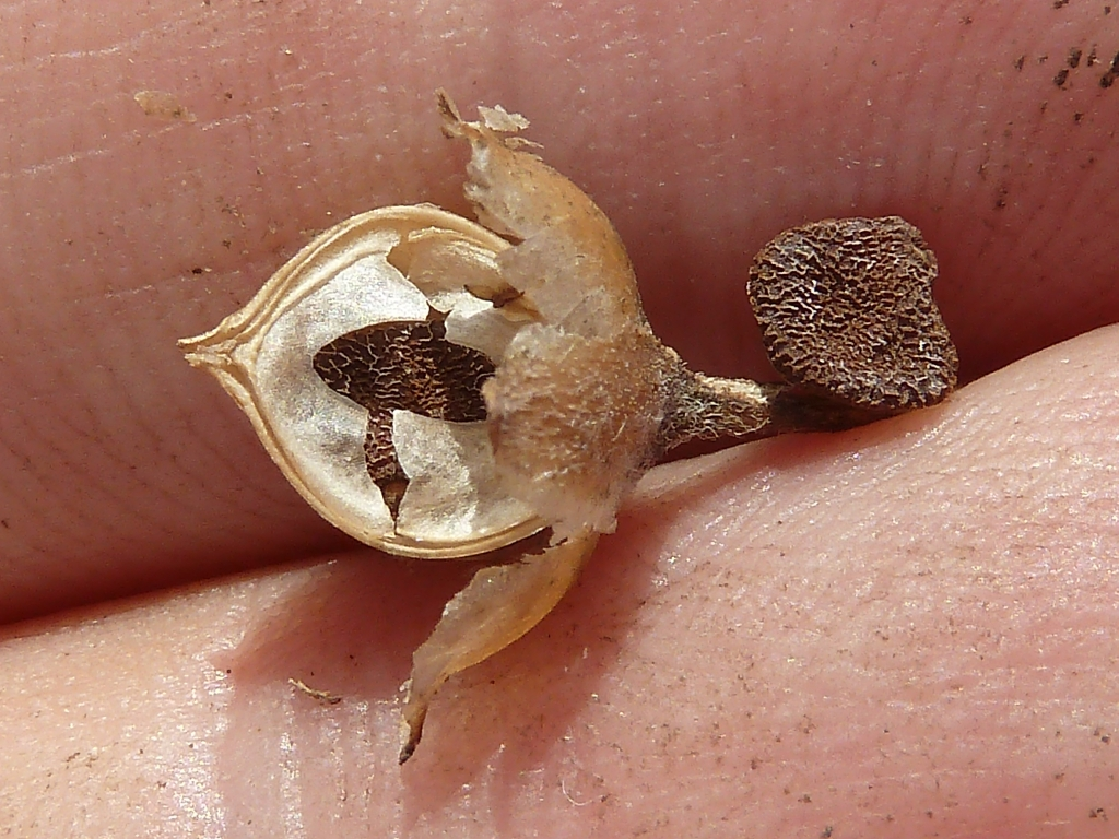 Convolvulus althaeoides L. - Cápsula abierta y semilla - Camino viejo de Alicante, Albatera (Alicante, España)